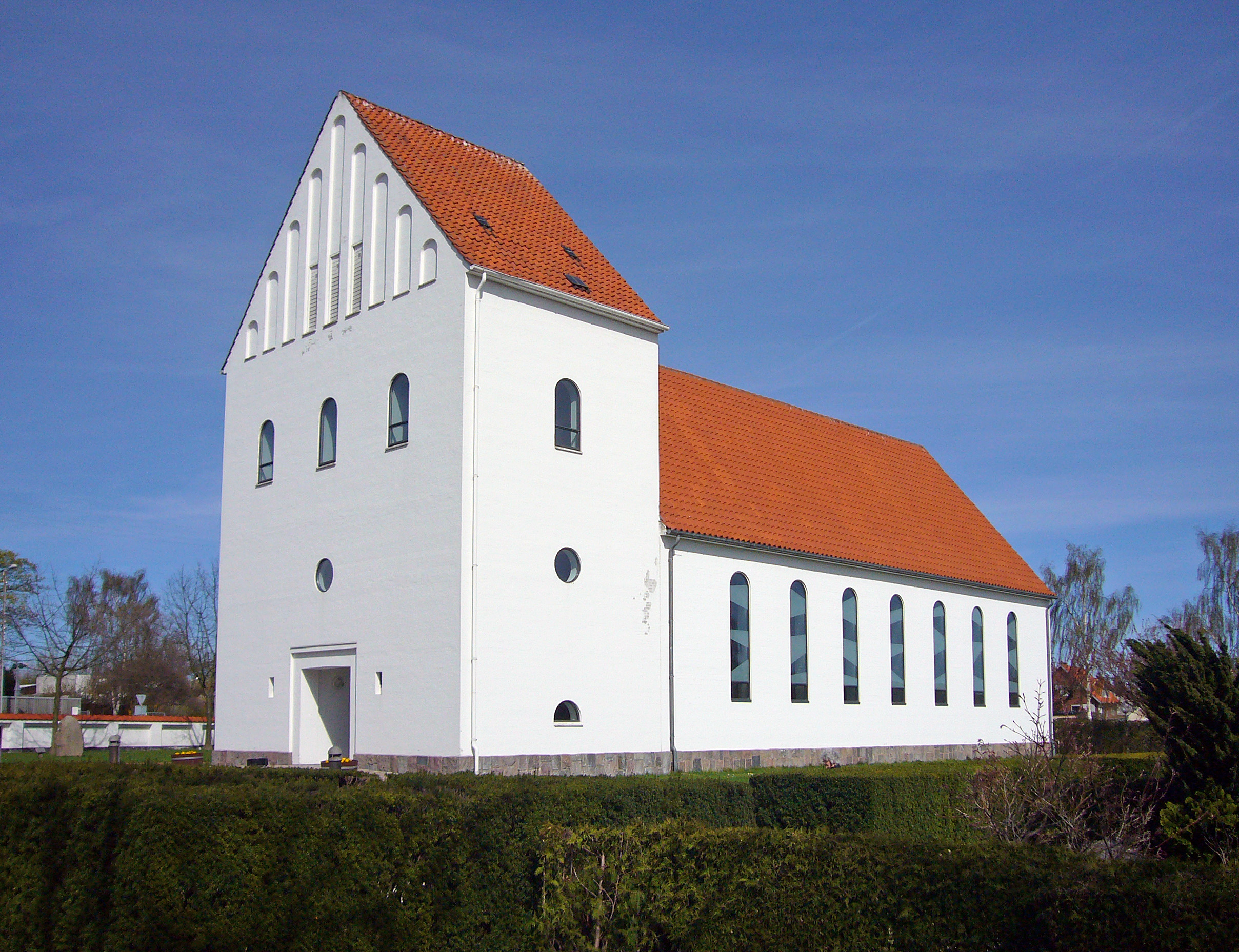 Ansgarkirken, Hedehusene, Denmark